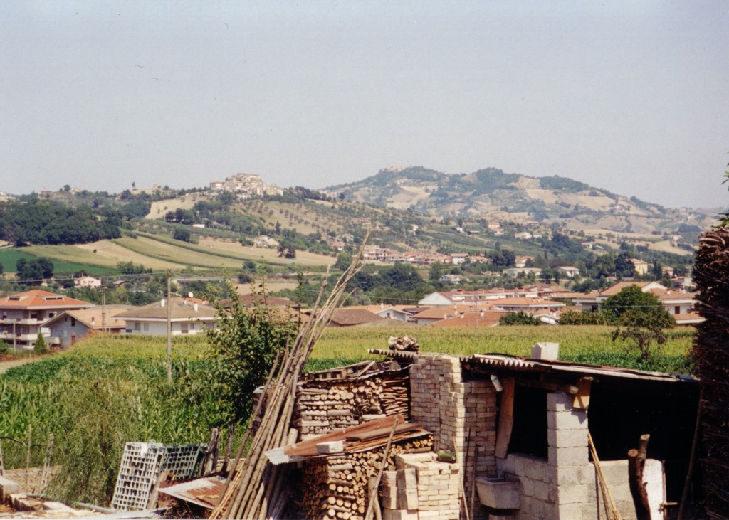 Basciano, Abruzzo, Italia